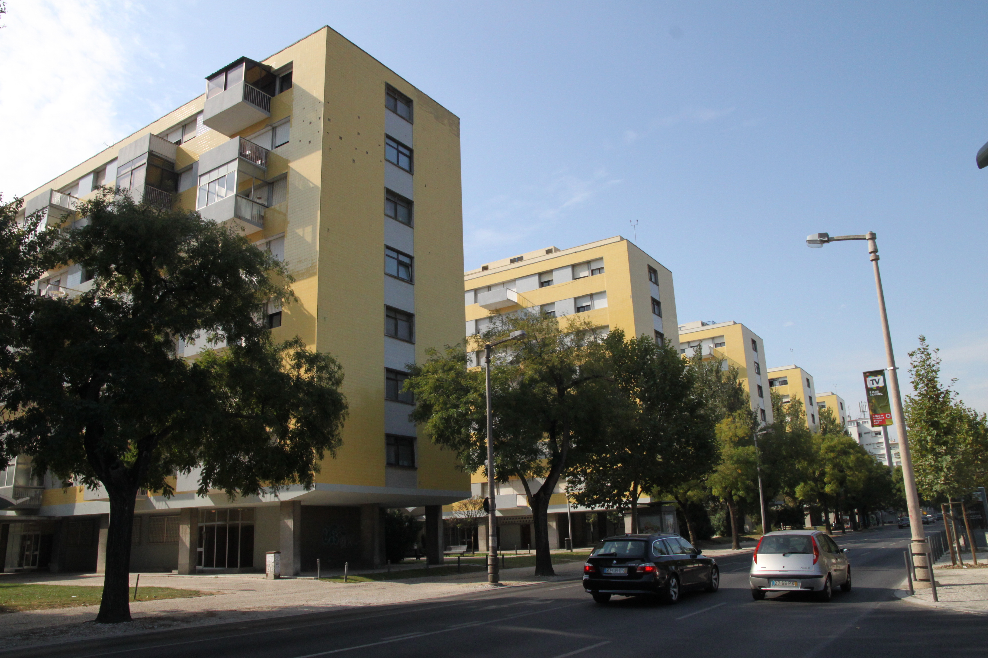 Conjunto habitacional da Avenida do Brasil This file was uploaded for Wiki Loves Monuments in Portugal with the unique identifier 97025080.